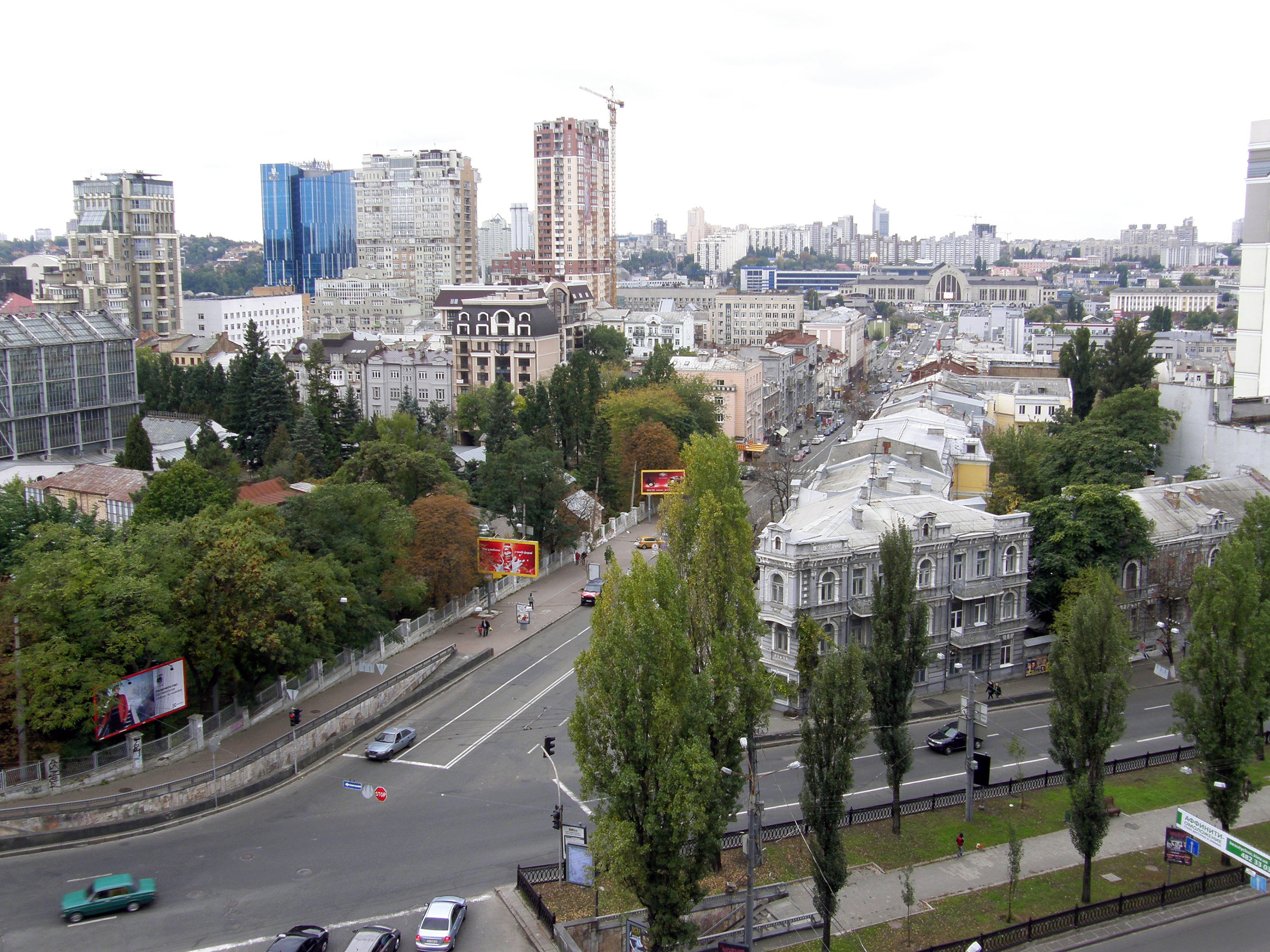 ул. Симона Петлюры